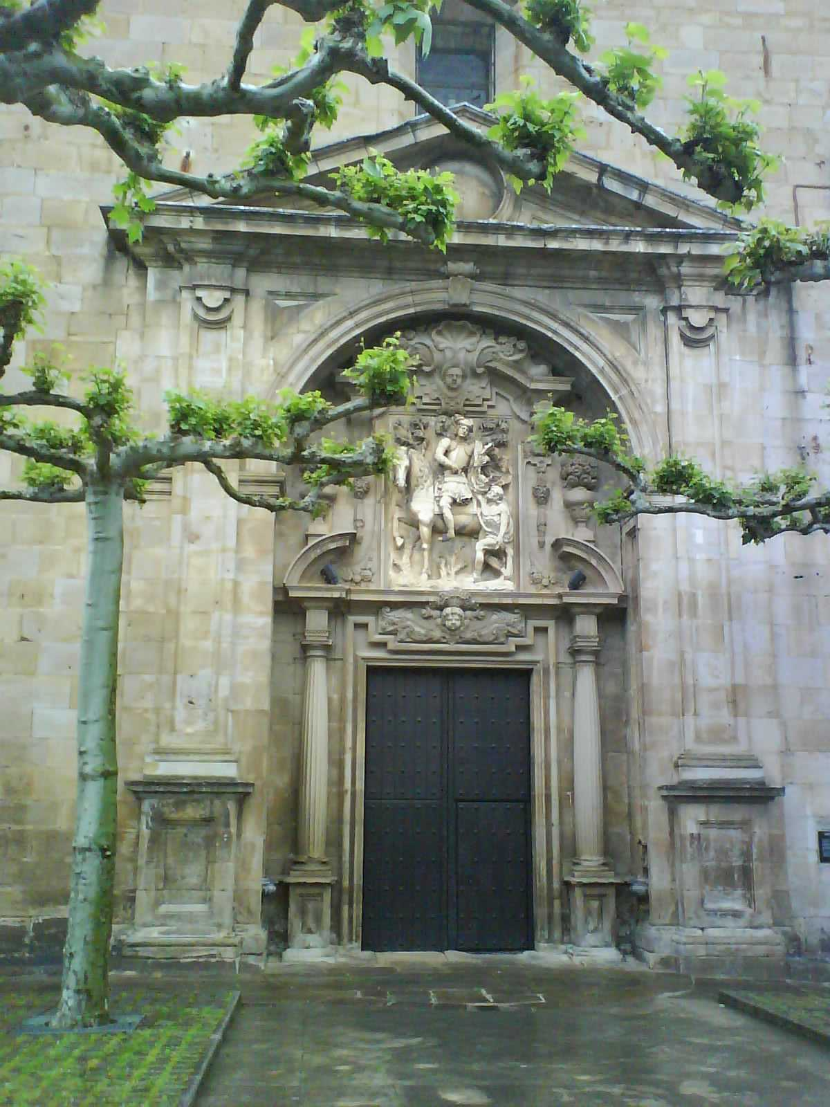 Cegama, portico de la iglesia de San Martín de Tours. Guipúzcoa, País Vasco (España).